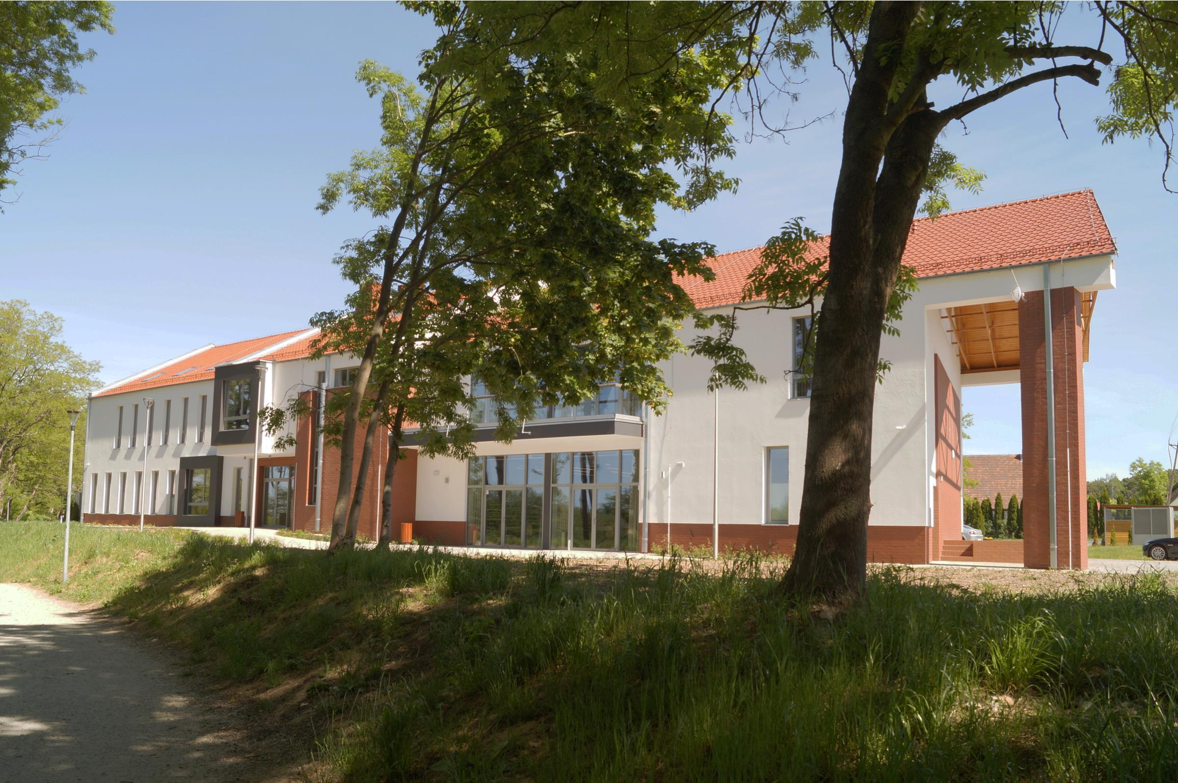 Gminne Centrum Kultury w Kłodawie, ul. Jeziorna 8